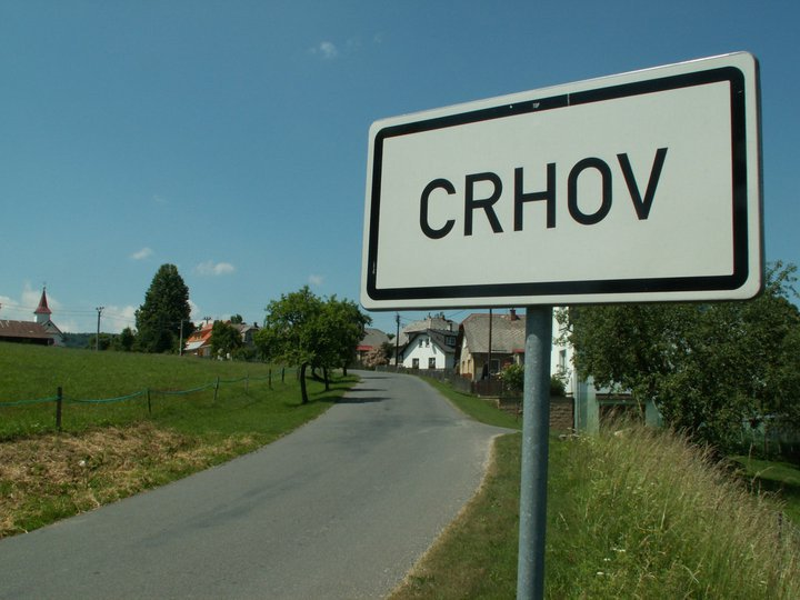 Crhov, pohled na Draha od Zadní Rovinky